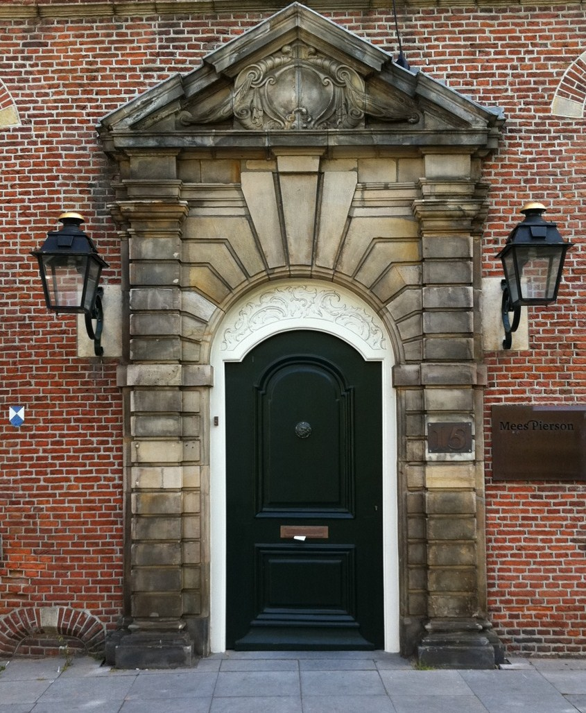 Kneuterdijk, kantoor Mees & Hope